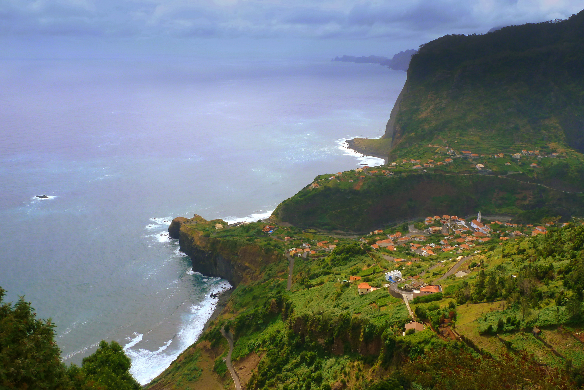 View near Santana, Madeira